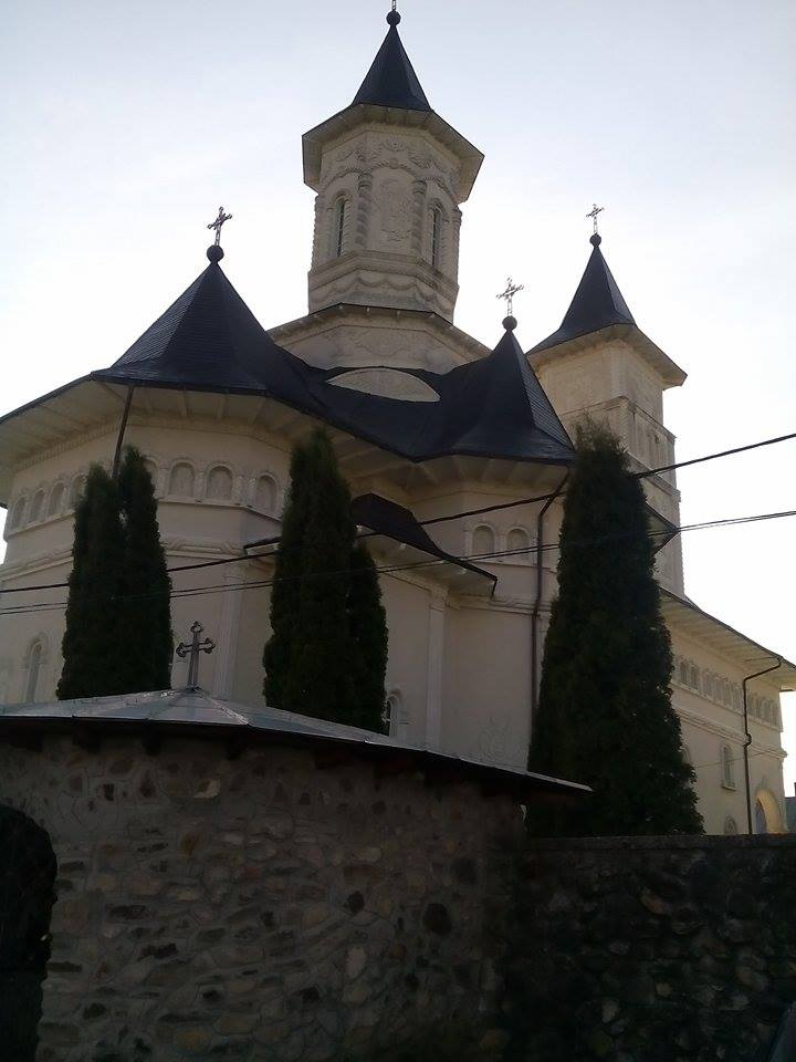 Mănăstirea Ciolpani, Buhuşi